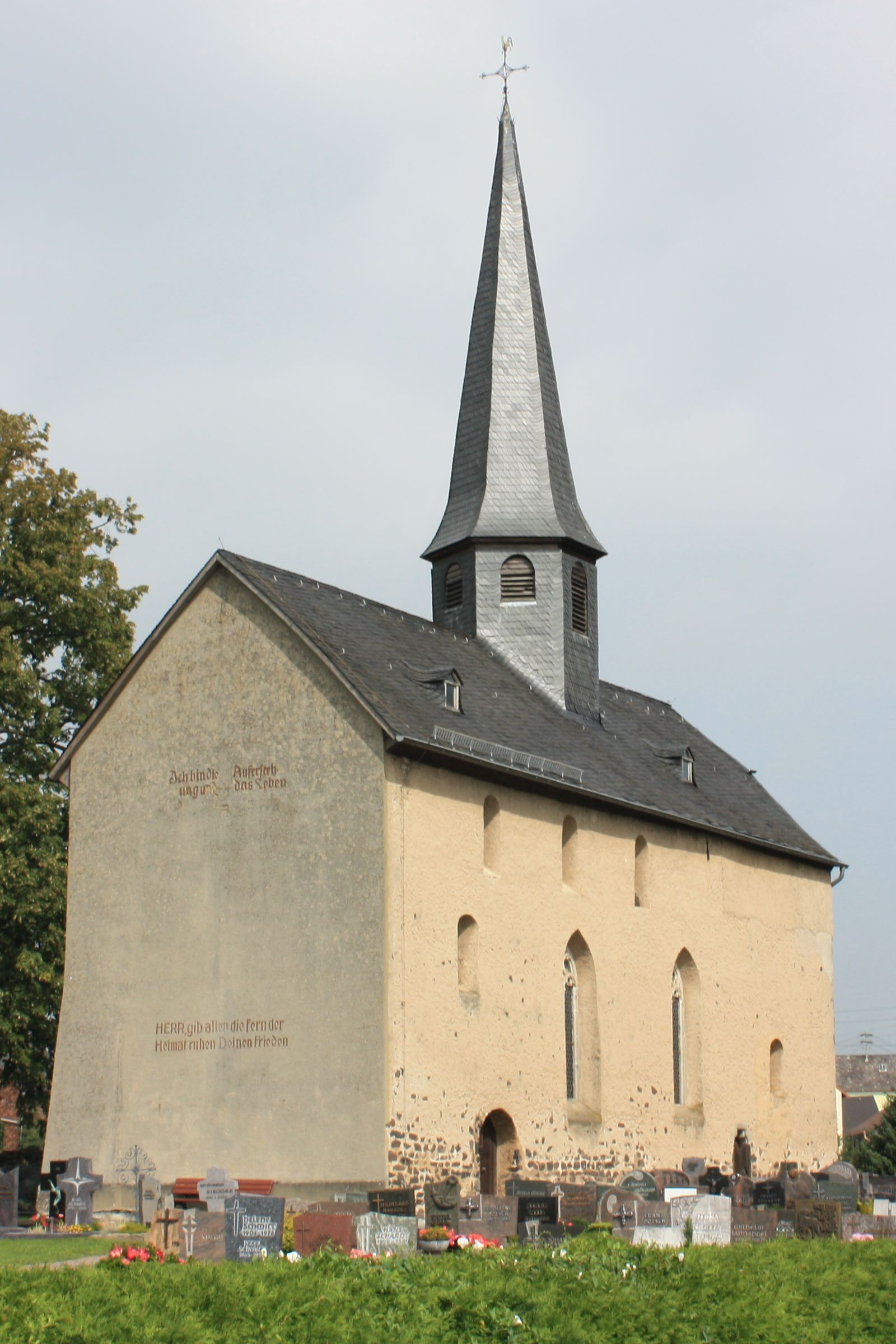 Die romanische Kapelle St. Nikolaus auf dem Friedhof von Dorchheim, Hessen von Südwesten aus gesehen. (erbaut seit dem 12. Jahrhundert, Pfarrkirche bis 1904)